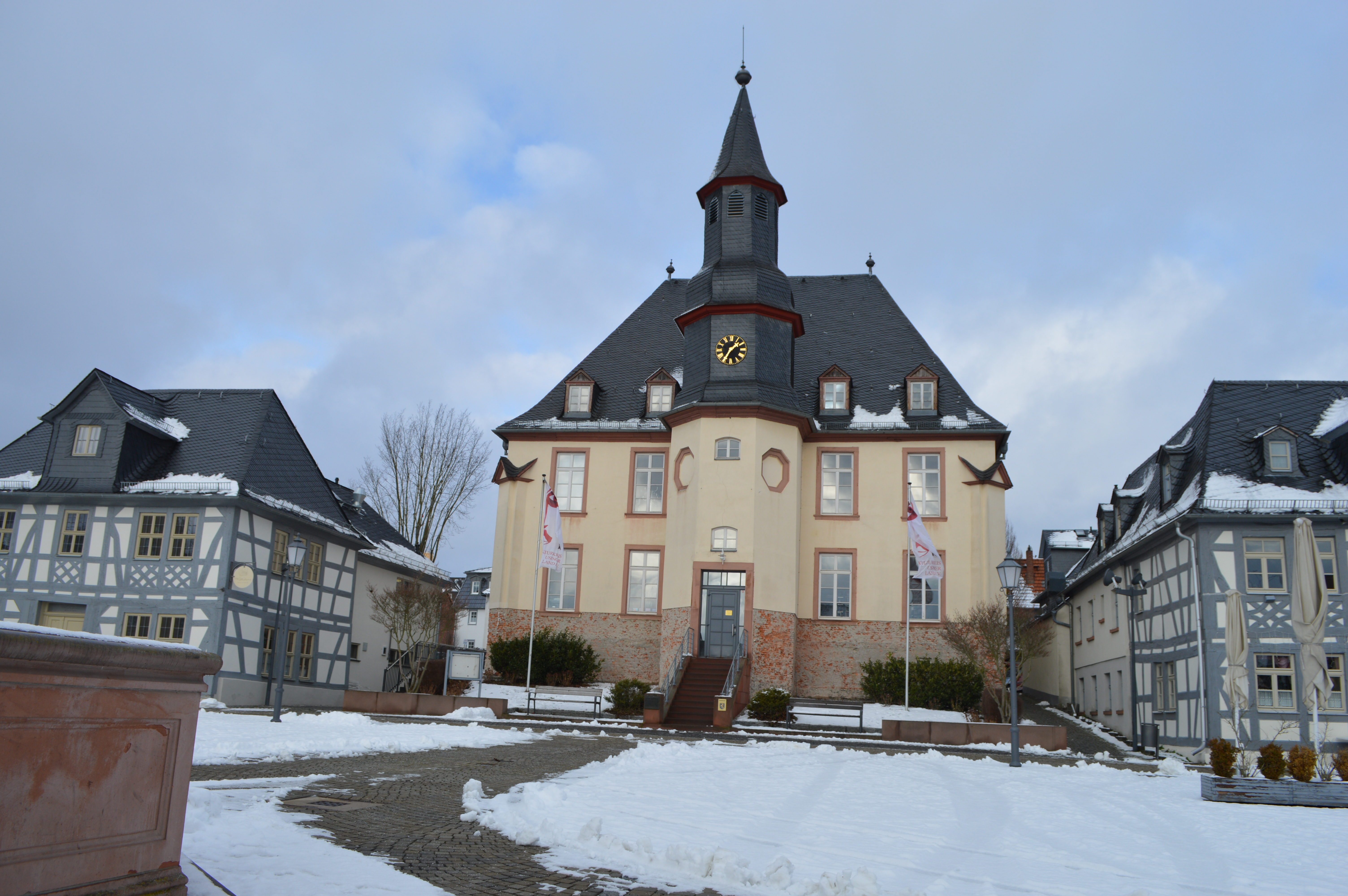 Alter Marktplatz Hugenottenkirche Januar 2017